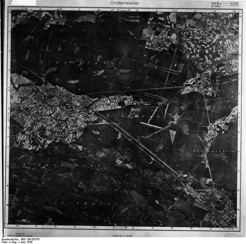 Grafenweiler